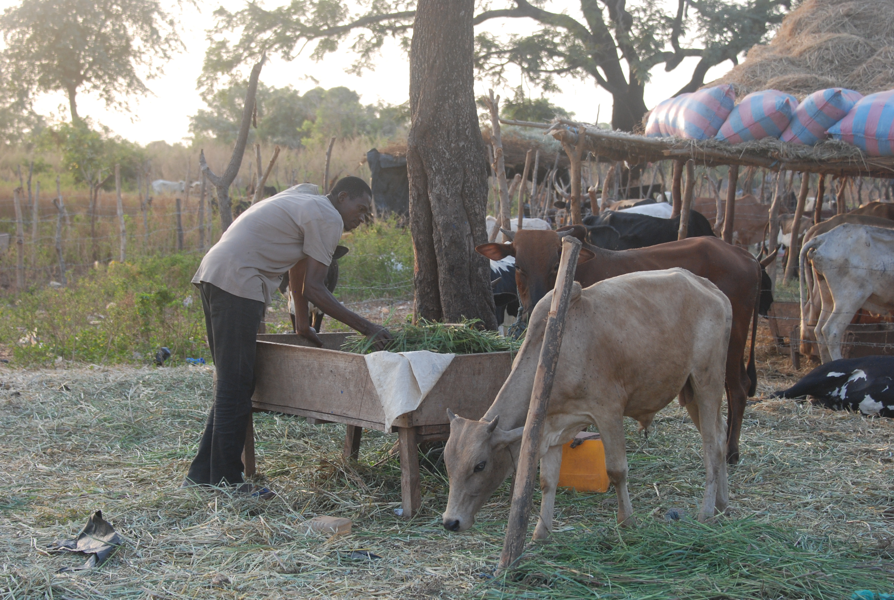 Un éleveur donnant à manger à ses bœufs, à Ferké au Nord de la Côte d'Ivoire. This is an image of "African people at work" from Ivory Coast